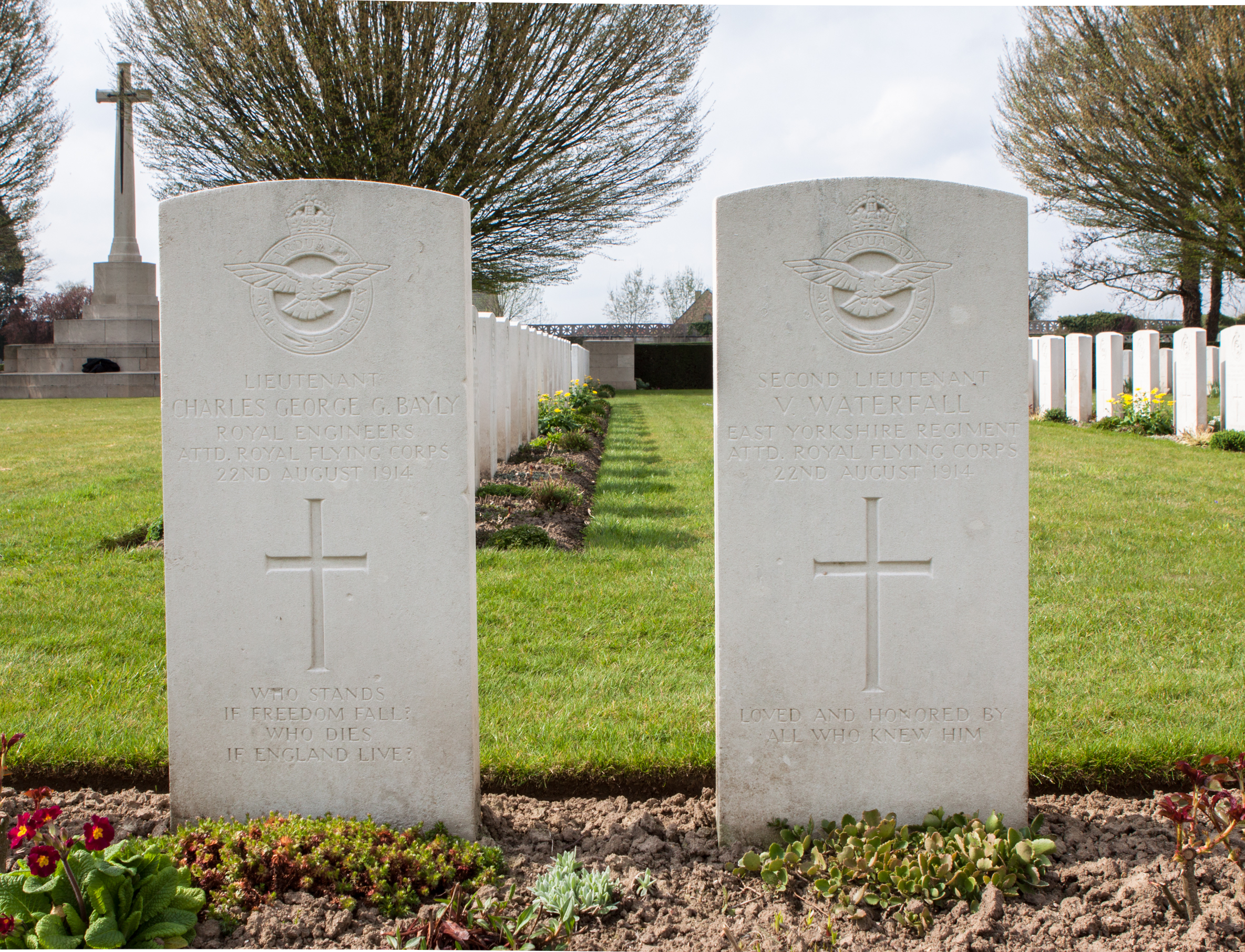 Tournai Communal Cemetery Allied Extension